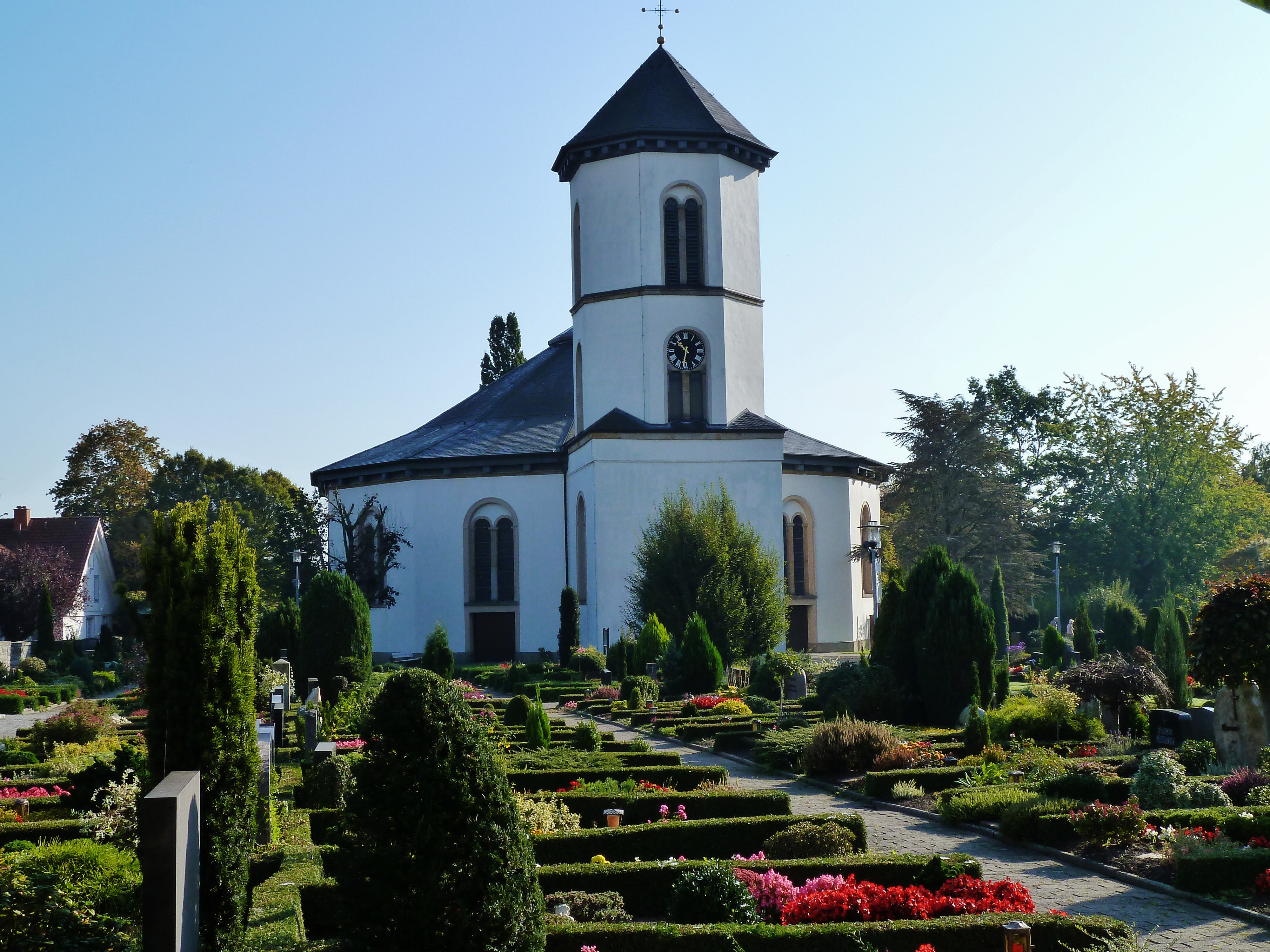 St.-Petrus-Kirche in Gesmold; Ansicht von Westen mit umliegendem Friedhof